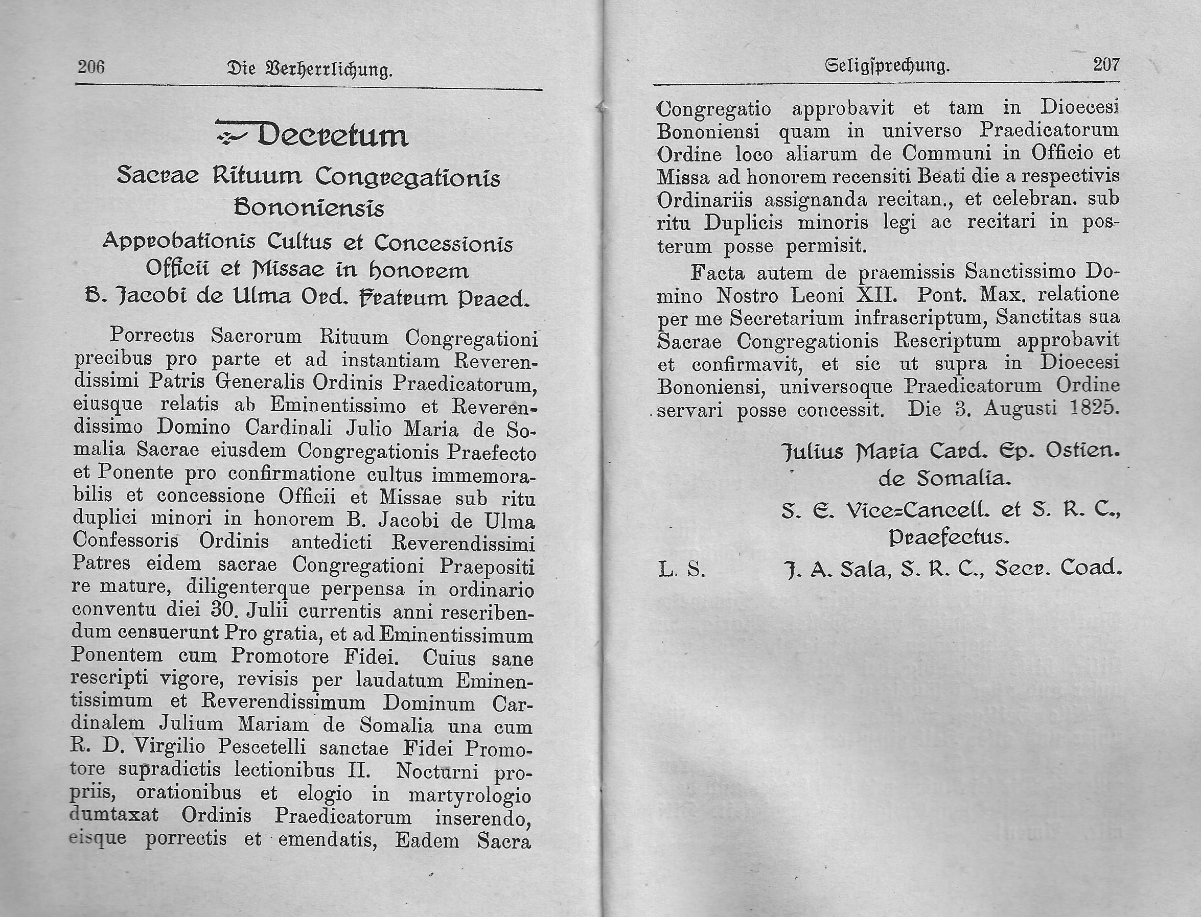 Papst Leo XII. genehmigt den Kult des seligen Jakob von Ulm (Jakob Griesinger) im Dominikanerorden und in der Diözese Bologna, Lateinisches Deket der Ritenkongregation